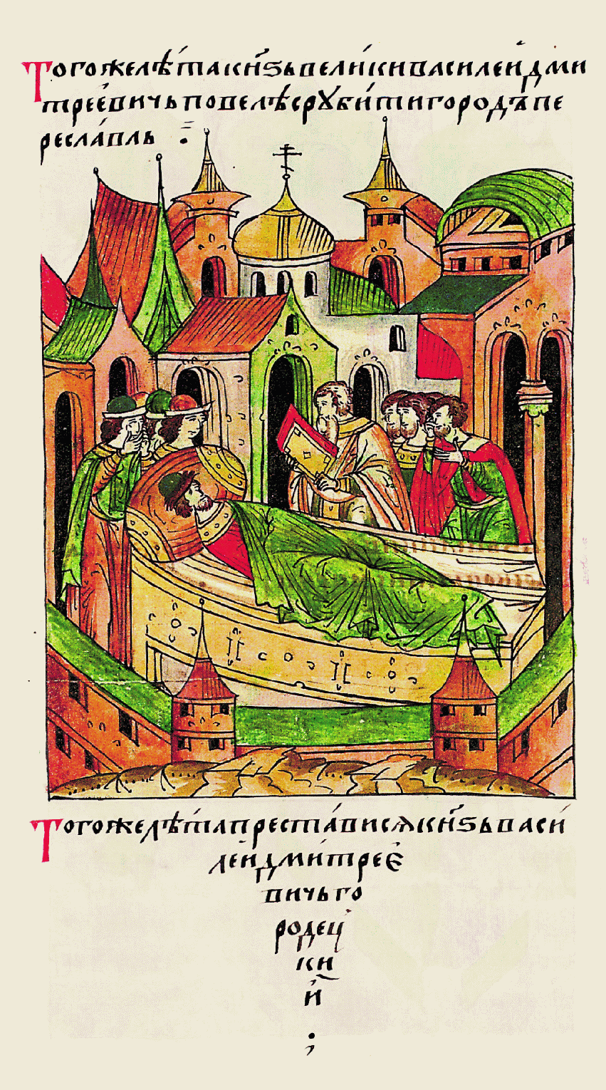 В том же году преставился князь Василий Дмитриевич Городец- кий